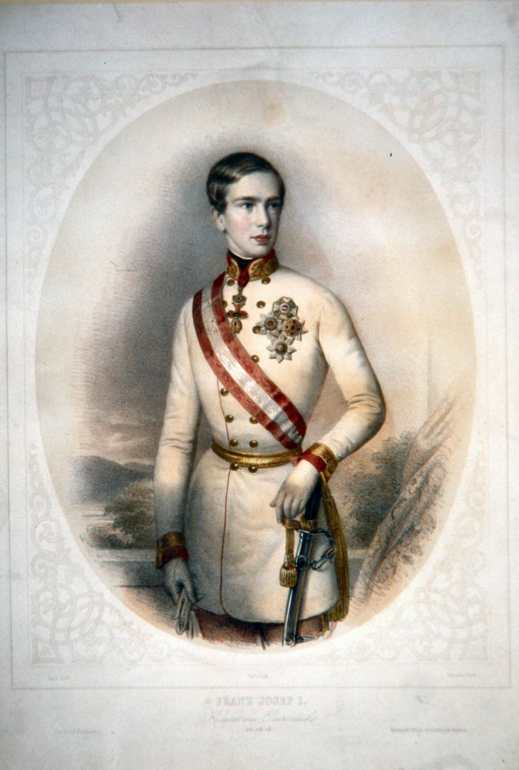 Franz Josef I. (1830-1916), Kaiser von Österreich, König von Ungarn etc. etc. Lithographie von Gabriel Decker, ca. 1855